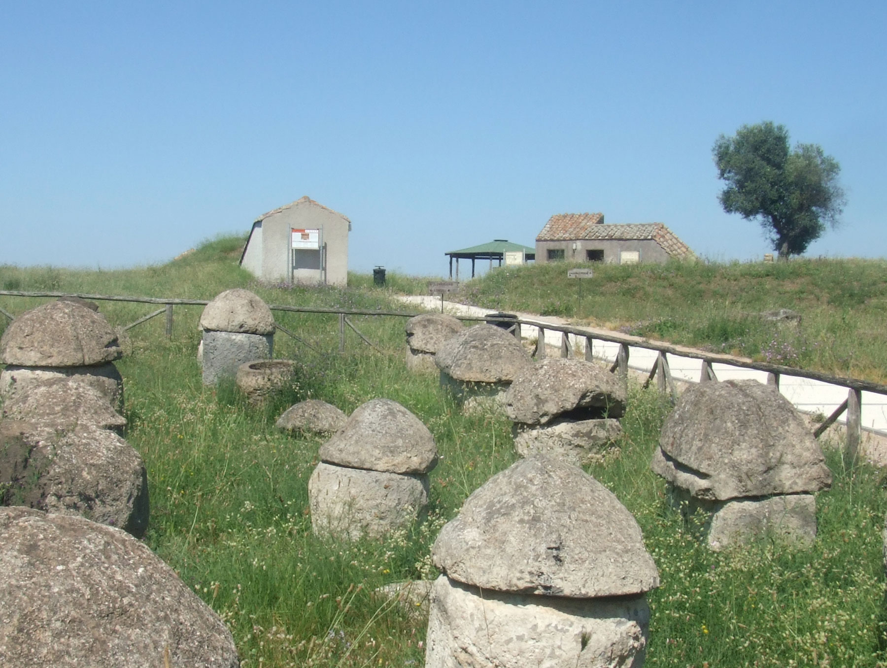 Champs d'urnes et cabanes d'accés aux tombes du site de Monterozzi (Latium - Italie)